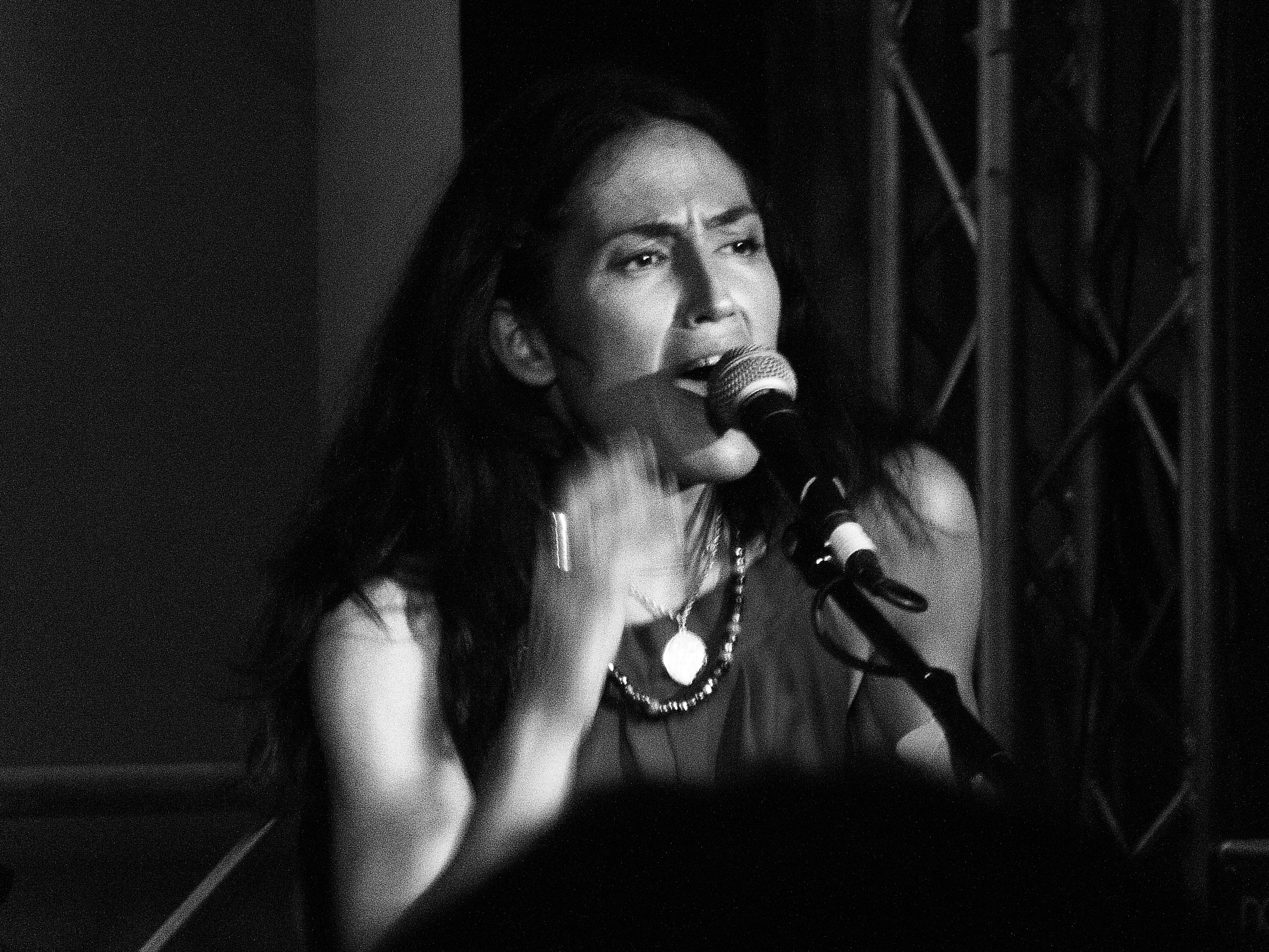 @ Radarfestival, PD